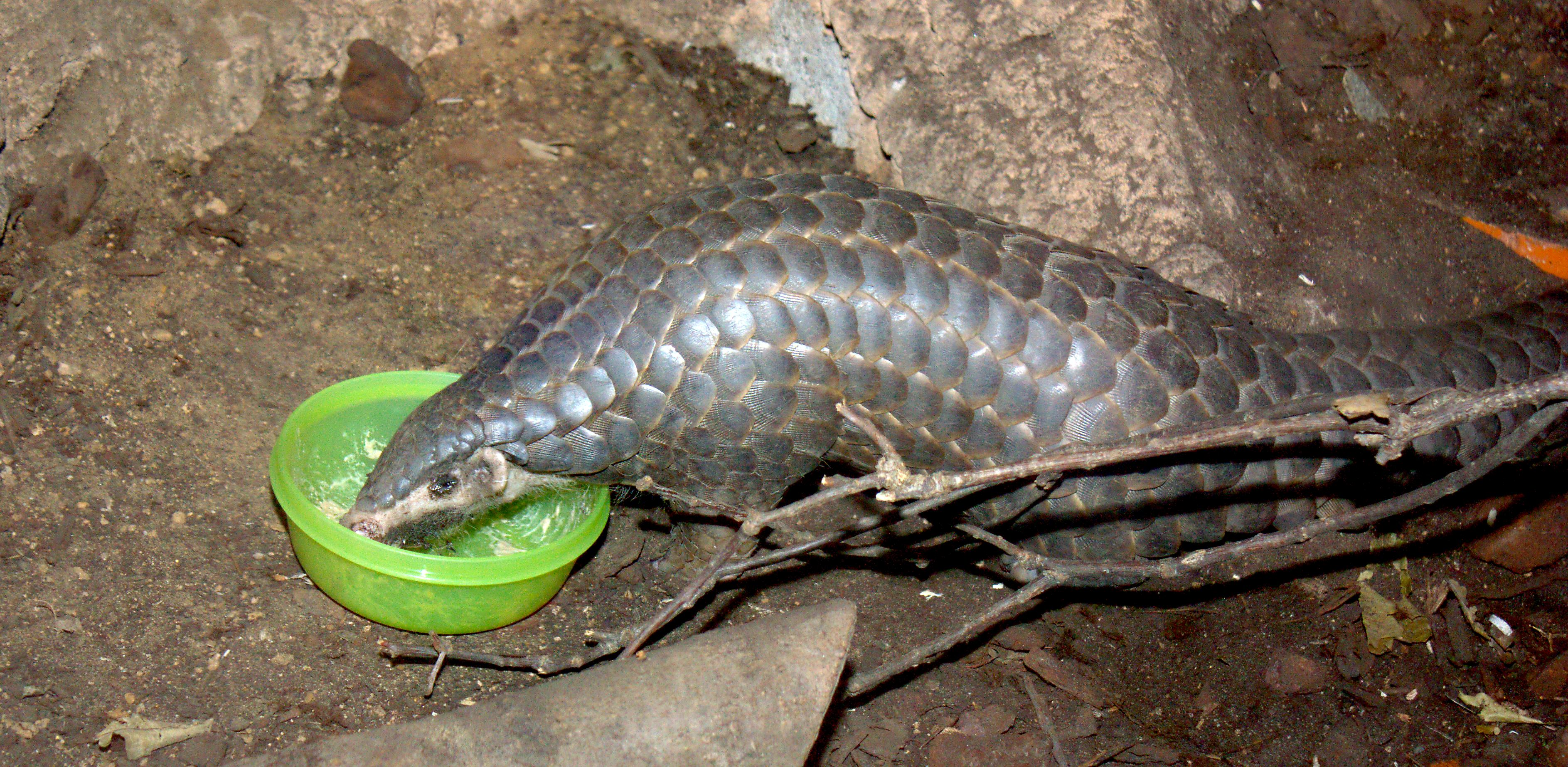 Bild des Chinesischen Ohrenschuppentiers im Leipziger Zoo